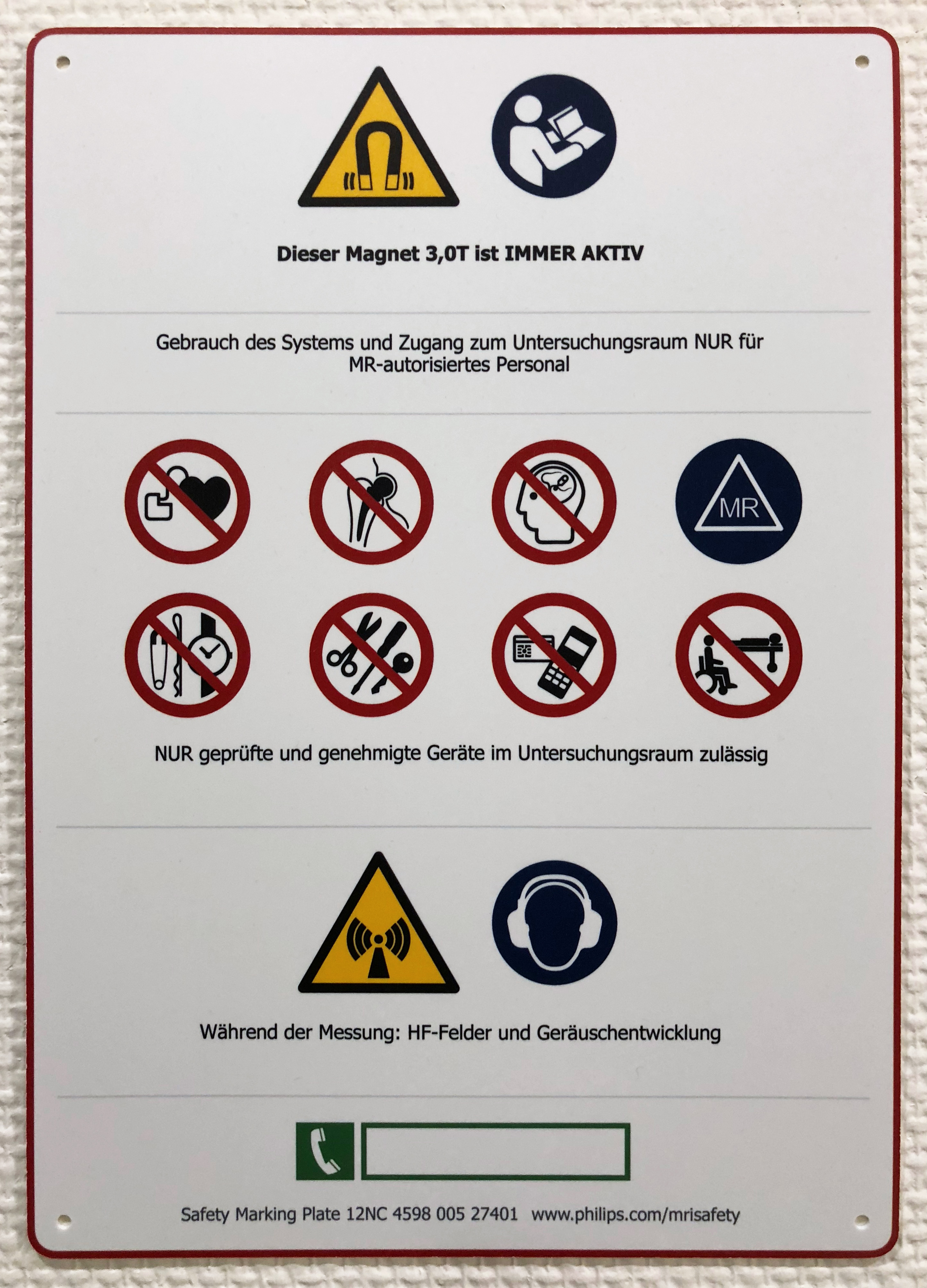 Warntafel bei MRT